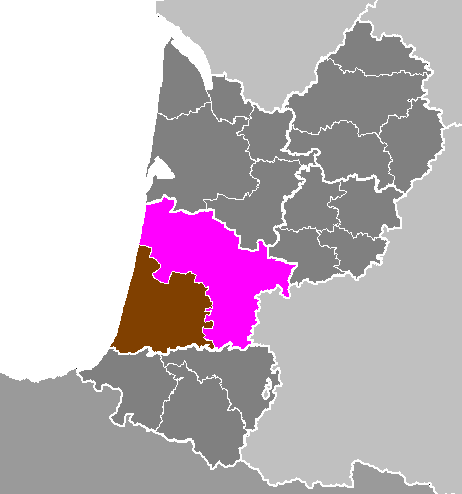 Maps of arrondissements and cantons of France: Département des Landes - Arrondissement de Mont-de-Marsan.PNG (Région Aquitaine)